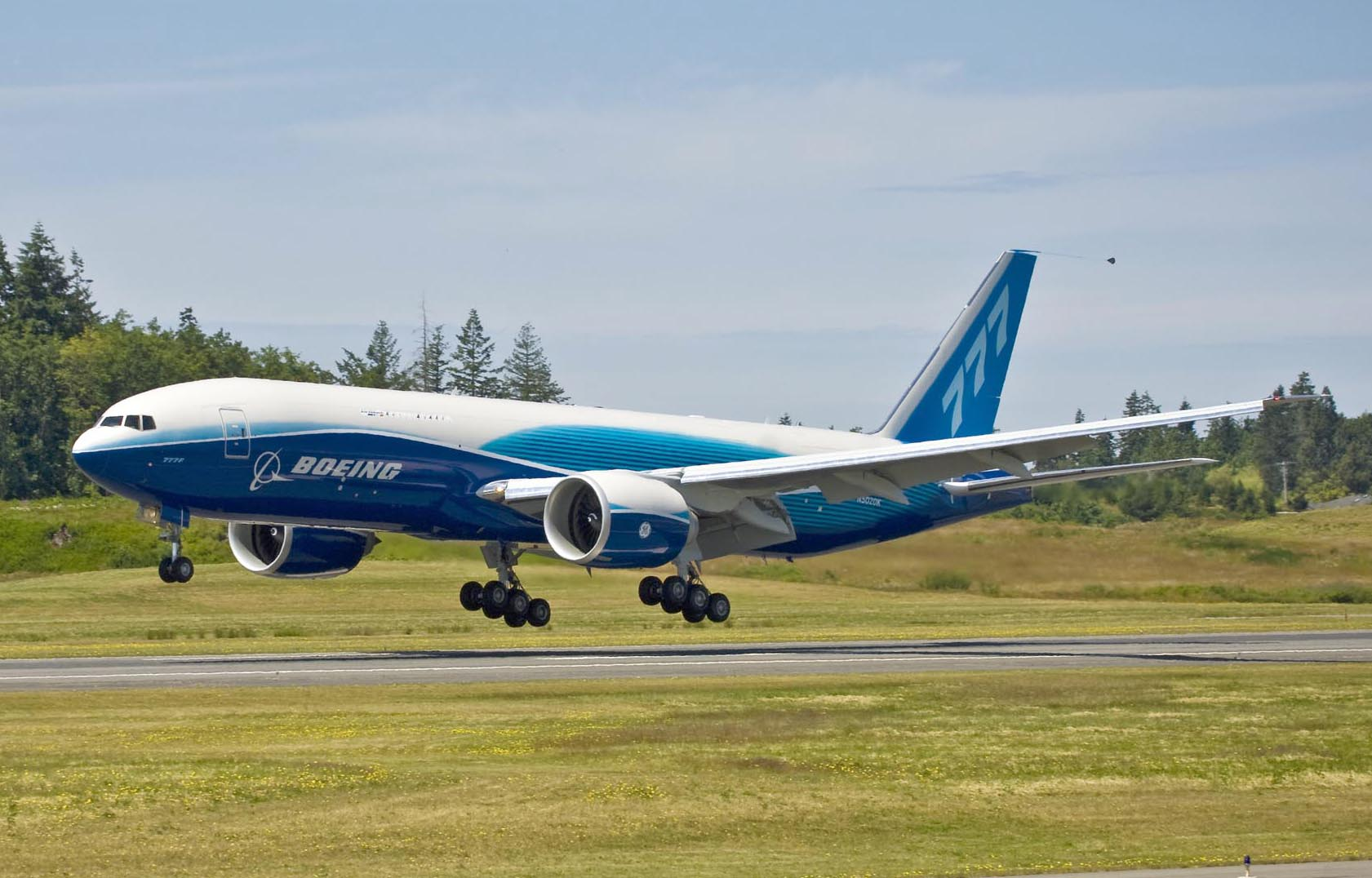 First 777F Freighter Lands after B-1 Flight K64503-40